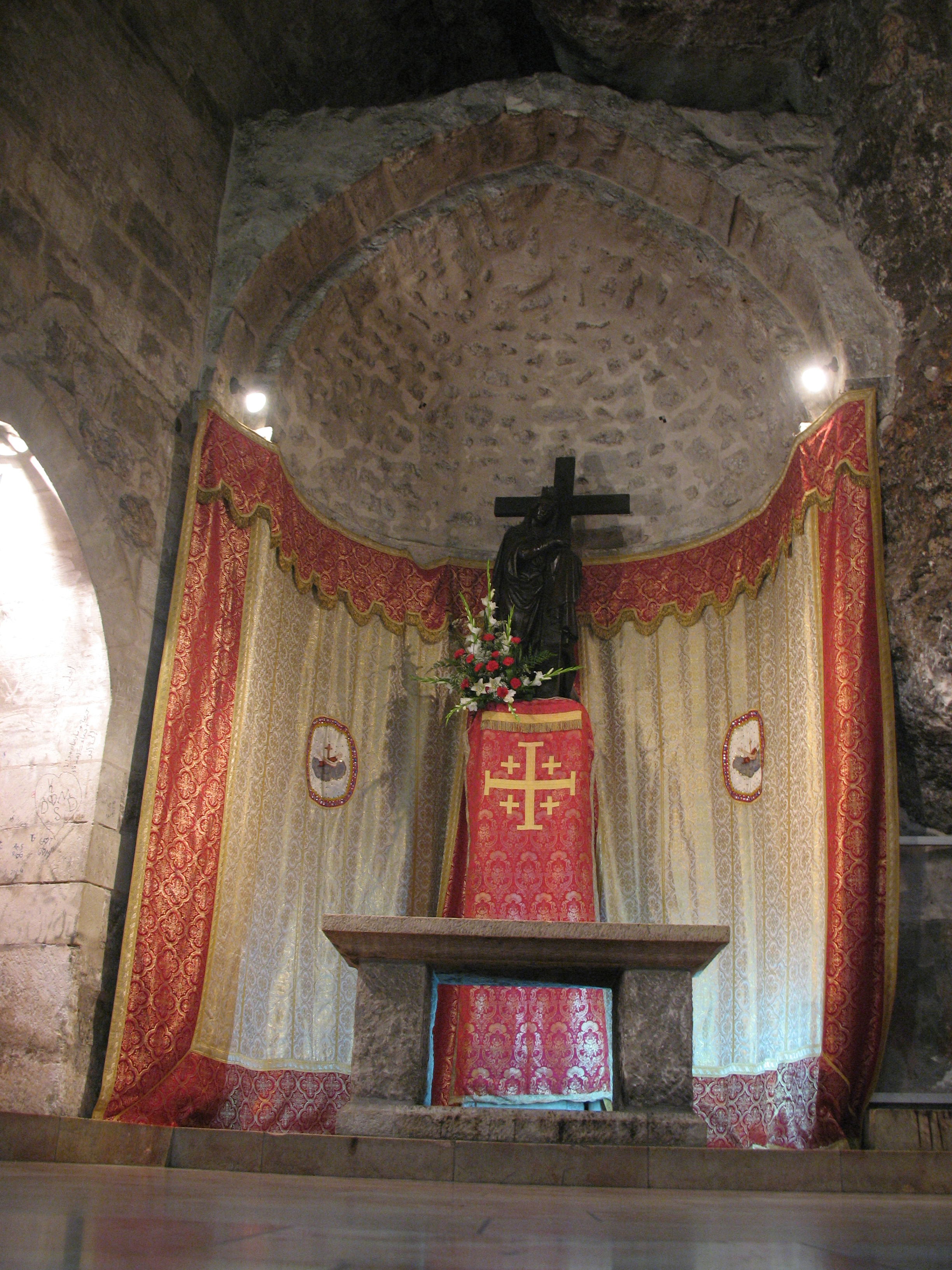 Статуя святой Елены и католический престол в приделе Обретения Креста Храма Гроба Господня в Иерусалиме.